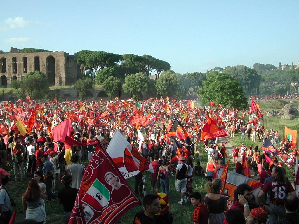 Roma (Italia), 17 giugno 2001. Al termine della sfida tra A.S. Roma e Parma A.C. (3-1) valevole per la 34ª e ultima giornata del campionato italiano di Serie A 2000-01, i tifosi romanisti si ritrovano al Circo Massimo per festeggiare la vittoria dello Scudetto.